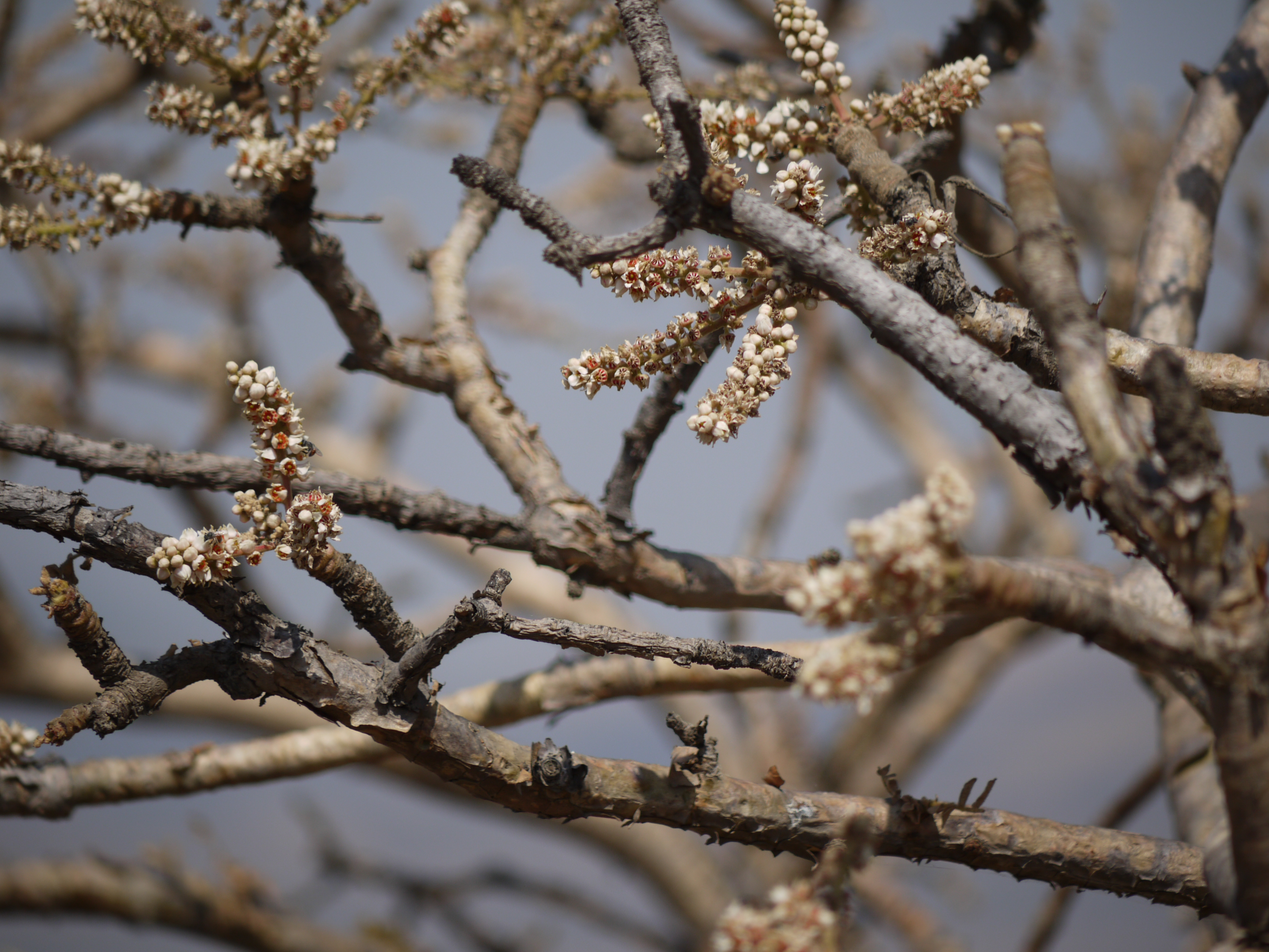 Burseraceae (incense or torchwood family) » Boswellia serrata bos-WELL-ee-a -- named for John Boswell, Scottish botanist and FRCP of Edinburgh sair-AY-tuh or ser-RAT-uh -- toothed like a saw commonly known as: Indian frankincense tree, Indian olibanum tree, salai tree • Gujarati: સાલેડી saaledi, સલાઈ ગૂગળ salaai gugul • Hindi: शल्लकी shallaki • Kannada: ಗುಗ್ಗುಳ ಮರ guggula mara • Malayalam: കുങ്ങില്യം kungilyam • Marathi: धुपाळी dhupali, धूपसाळी dhupasali, कुरुंद kurunda, सालफळी salaphali, साळई salai, साळी sali • Oriya: salai • Pali: सल्लकी sallaki • Punjabi: ਸਾਲ੍ਹੇ salhe, ਸਾਲਹੀ salhi • Sanskrit: भीषण bhishan, गुग्गुल guggula, हस्तिनशना hastinashana, पालंक palank, पार्वती parvati, ऱ्हादिनी hradini, कुरुन्द kurunda, सल्लकी sallaki, शल्लकी shallaki, स्रुवा sruva • Tamil: குமஞ்சம் kumancam, குங்கிலியம் kunkiliyam, மரத்துவெள்ளை marattu-vellai, பறங்கிச்சாம்பிராணி paranki-c-campi-rani, வெள்ளிக்கீரை vellai-k-kirai • Telugu: గుగ్గిలము guggilamu, పరంగిసాంబ్రాణిచెట్టు parangi-sambrani-chettu, సల్లకి sallaki ... the resin obtained from this tree is commonly known as: Indian olibanum, Indian frankincense, Konkani resin • Arabic: لبان luban • Hindi: कुंदर kundar, लोबान loban, मकन्द makand, मकुन्द makund • Kannada: ಚಿಲಕದೂಪ chilakadupa, ಧೂಪ dhupa, ಗುಗ್ಗುಳ guggula, ಹಾಲು ಮಡ್ಡಿ haalu maddi, ಲೋಬಾನ lobaana, ಪರಮ್ಗಿ ಸಾಮ್ಬ್ರಾಣಿ paramgi saambraani • Konkani: लोभान lobhan • Marathi: लोभान lobhan • Persian: گنده فيروزه gandha firoza, لوبان loban • Punjabi: ਲੋਬਾਣ loban • Sanskrit: द्विज dvija, कुन्दुर kundur, कुन्दुरु kunduru, मुकुन्दः mukundah, पालंकी palanki, पालंक्या palankya, सुरभी surabhi, तुरुष्क turushka • Telugu: కుందురువు kunduruvu • Urdu: لوبان loban Endemic to: India References: Flowers of India • NPGS / GRIN • DDSA